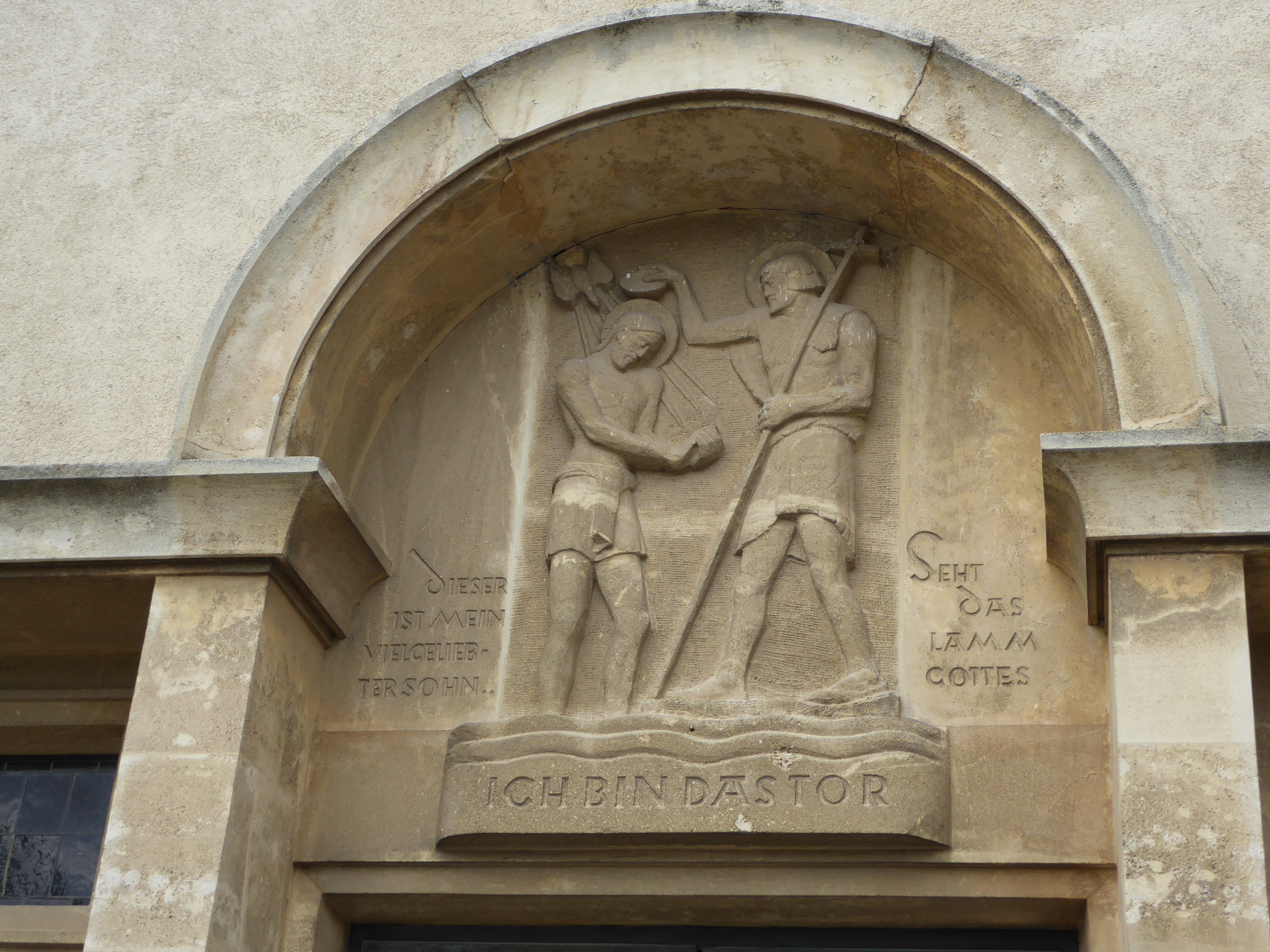 Pfarrkirche hl. Johannes der Täufer, Kirchengasse, Deutsch-Wagram, Niederösterreich - Relief Taufe Christi (Rudolf Schmidt) in der Mittellünette des Südportals